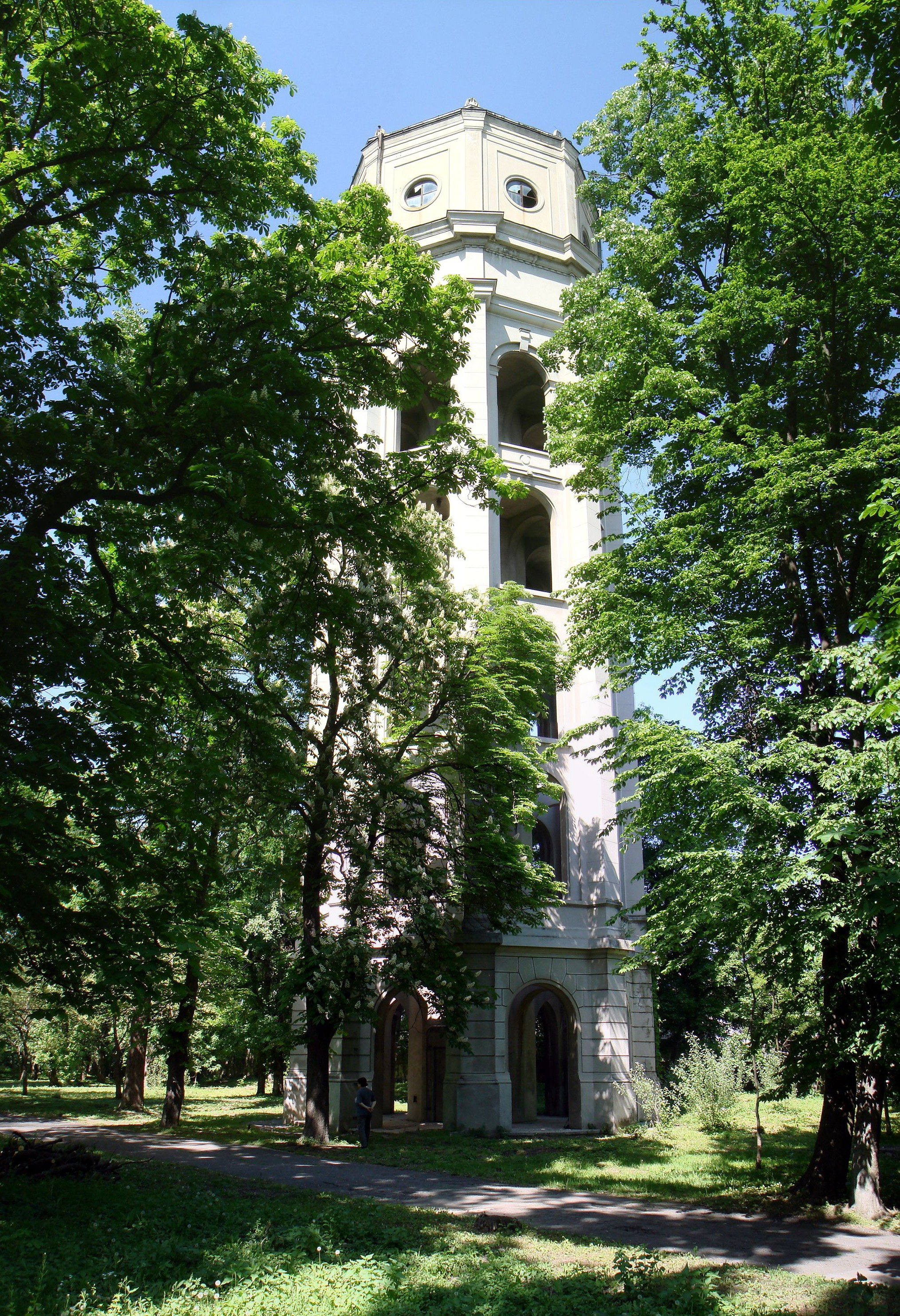 Castelul de apă din parcul palatului Știrbei din Buftea 04